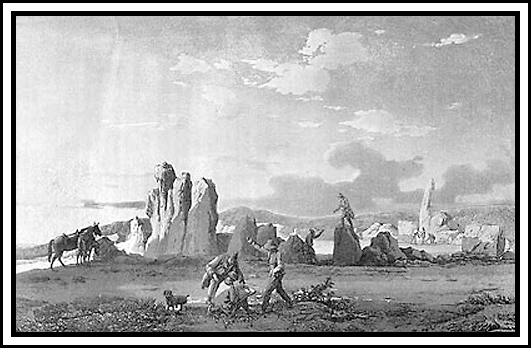 gravure du site d'Ħagar Qim par Jean-Pierre Houël de 1776